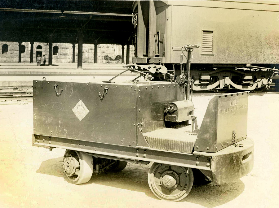 Chariot transporteur électrique “Elwell Parker electric truck”.WW1